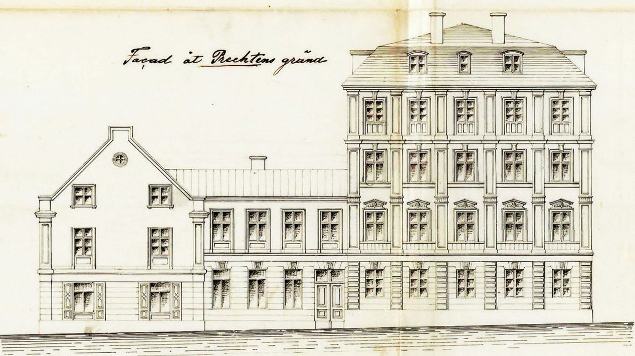 Om- och nybyggnadsförslag av husen mot Schönfeldts gränd (Daedalus 4), fasad